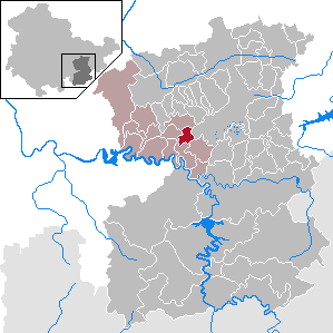 Keila in Thuringia - Saale-Orla-Kreis